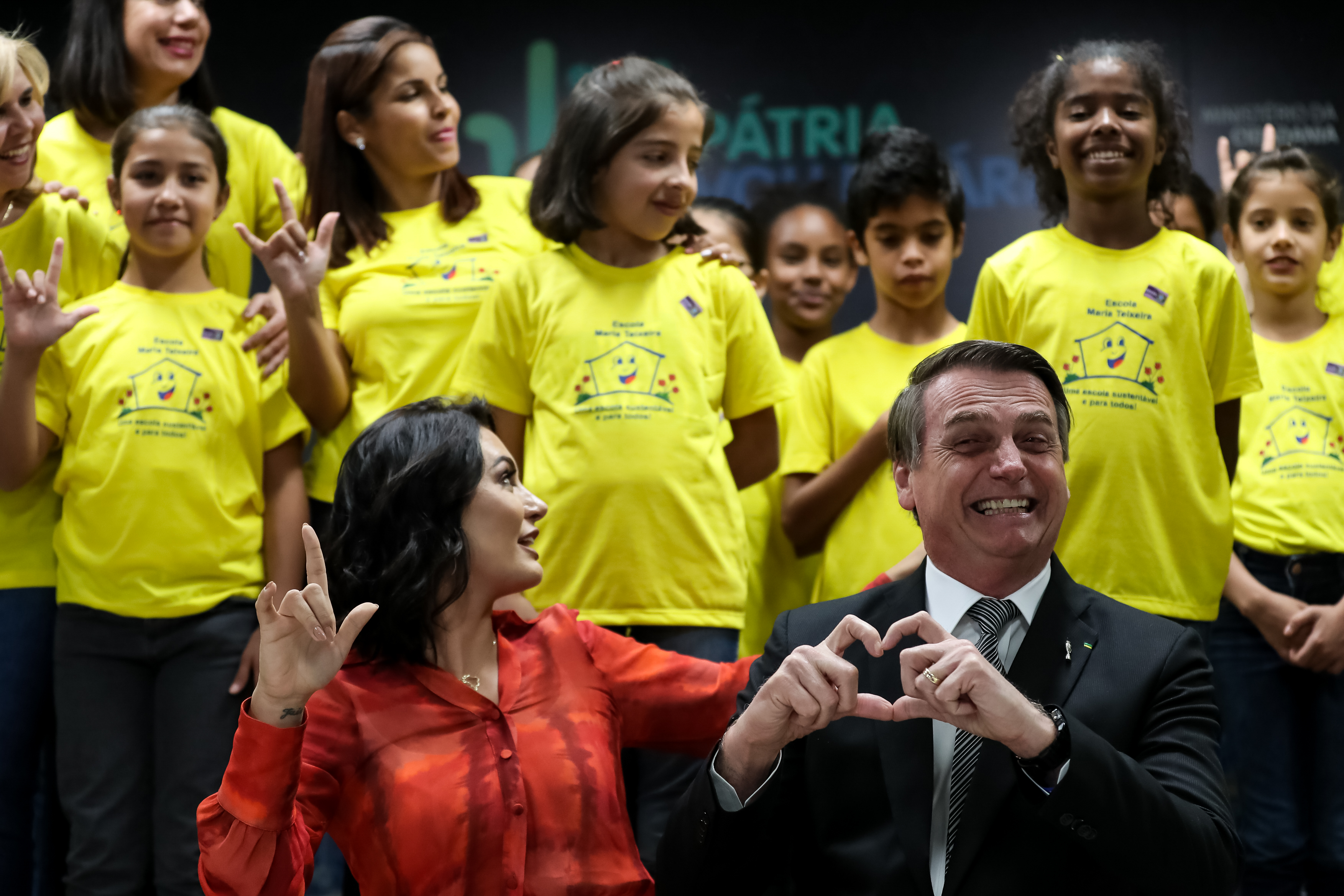 (Brasília - DF, 09/07/2019) Presidente da República Jair Bolsonaro e Senhora Michelle Bolsonaro, posam para foto com os alunos. Foto: Marcos Corrêa/PR